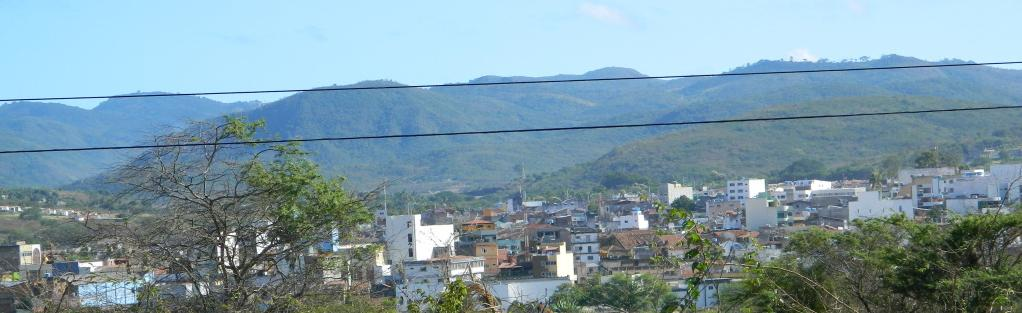 Belo Jardim Pernambuco.